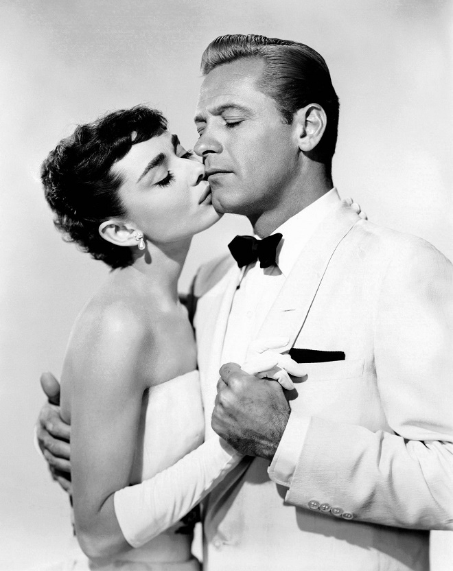 Audrey Hepburn & William Holden publicity photo for the film Sabrina (1954)